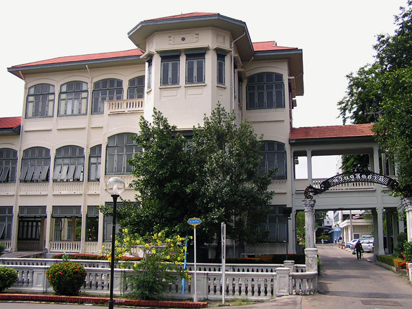 พระที่นั่งไวกูณฐเทพยสถาน พระราชวังพญาไท กรุงเทพมหานคร ประเทศไทย